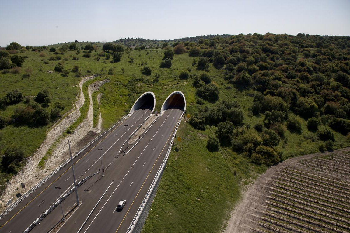 אדריכלות מנהרות ותכנון נוף, כביש 6